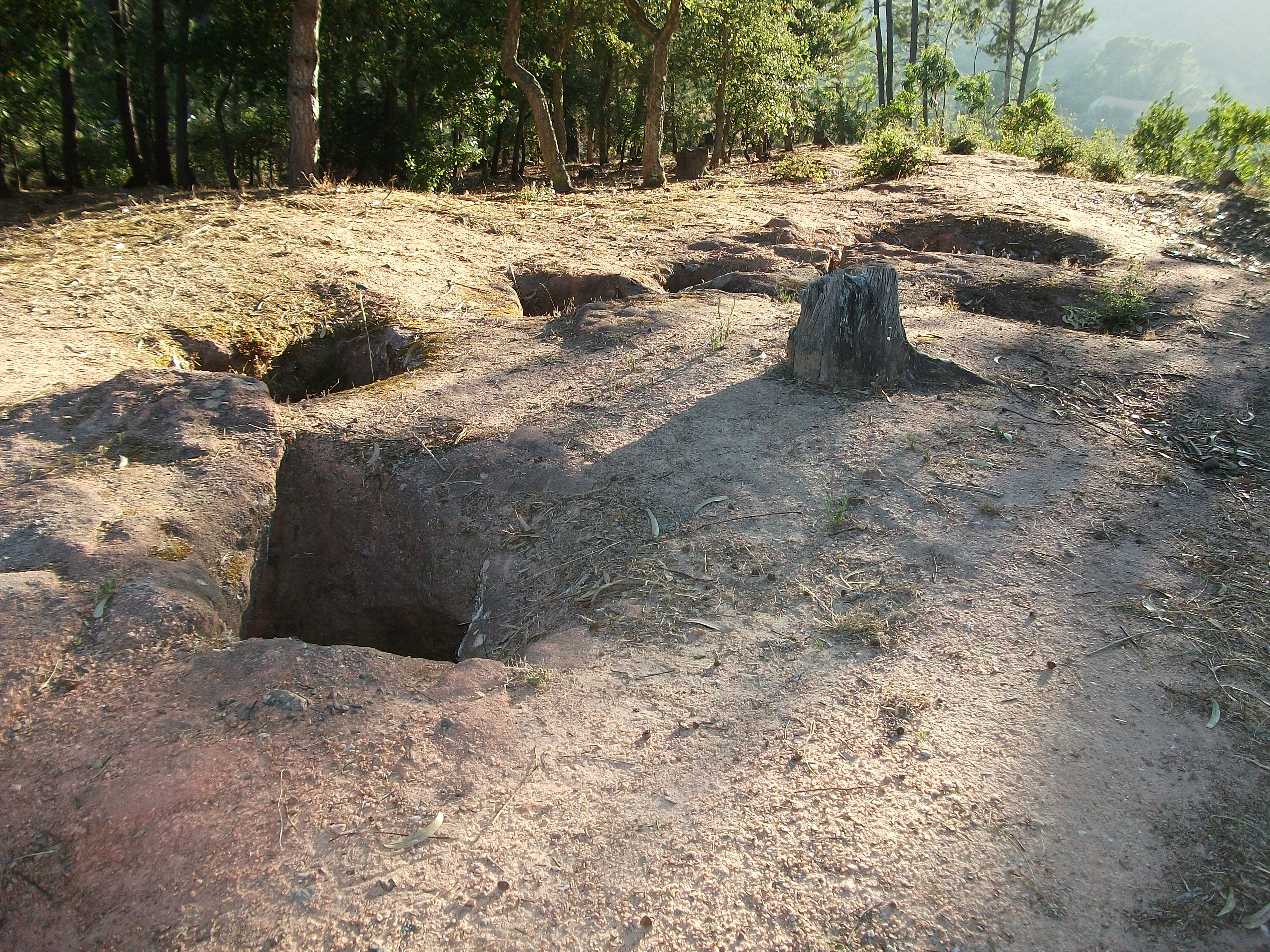 Potes mouros, Alcobertas, Rio Maior - Portugal